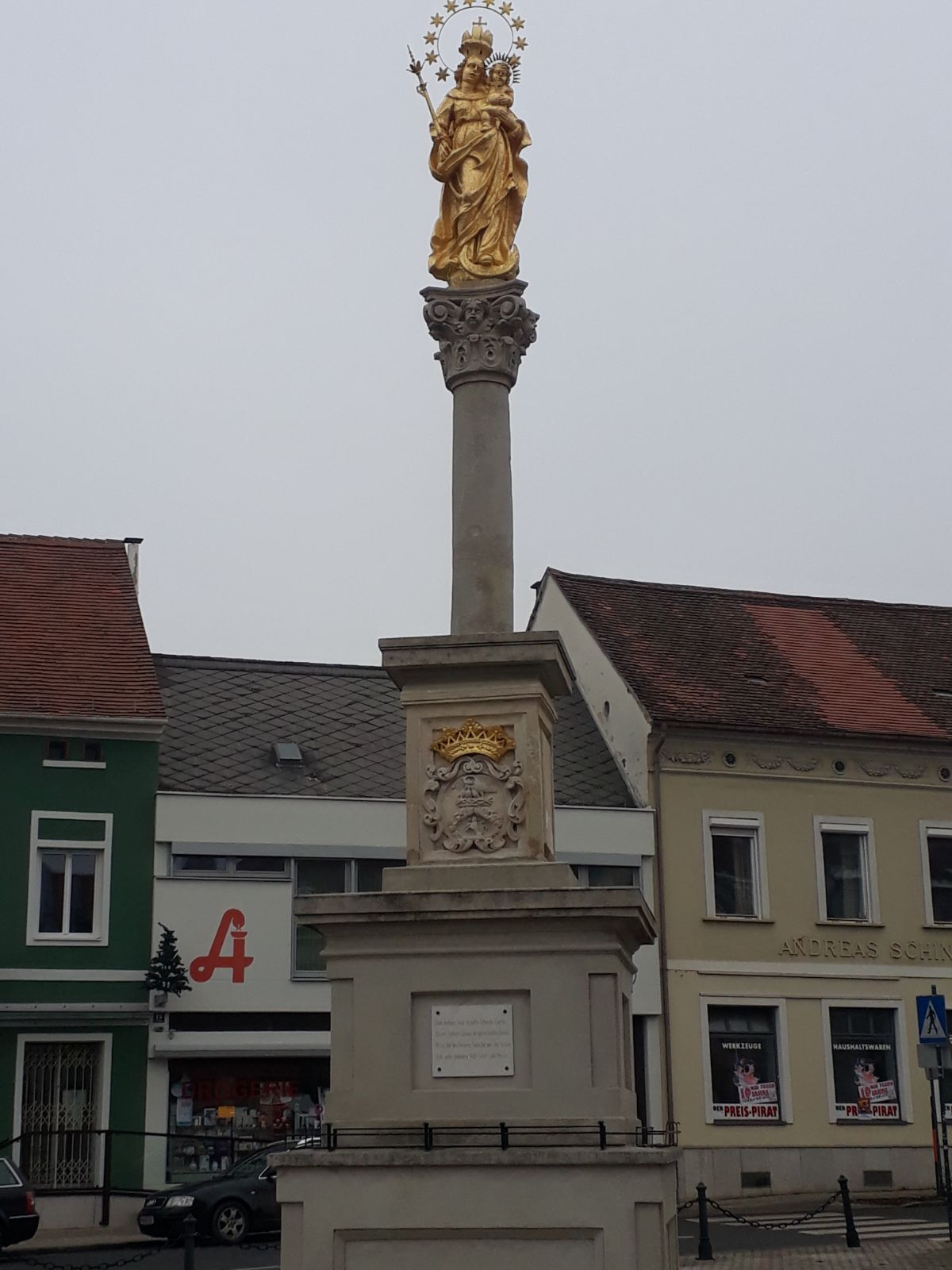 Dieses Bild zeigt die auf dem Hauptplatz in Pinkafeld stehende Mariensäule